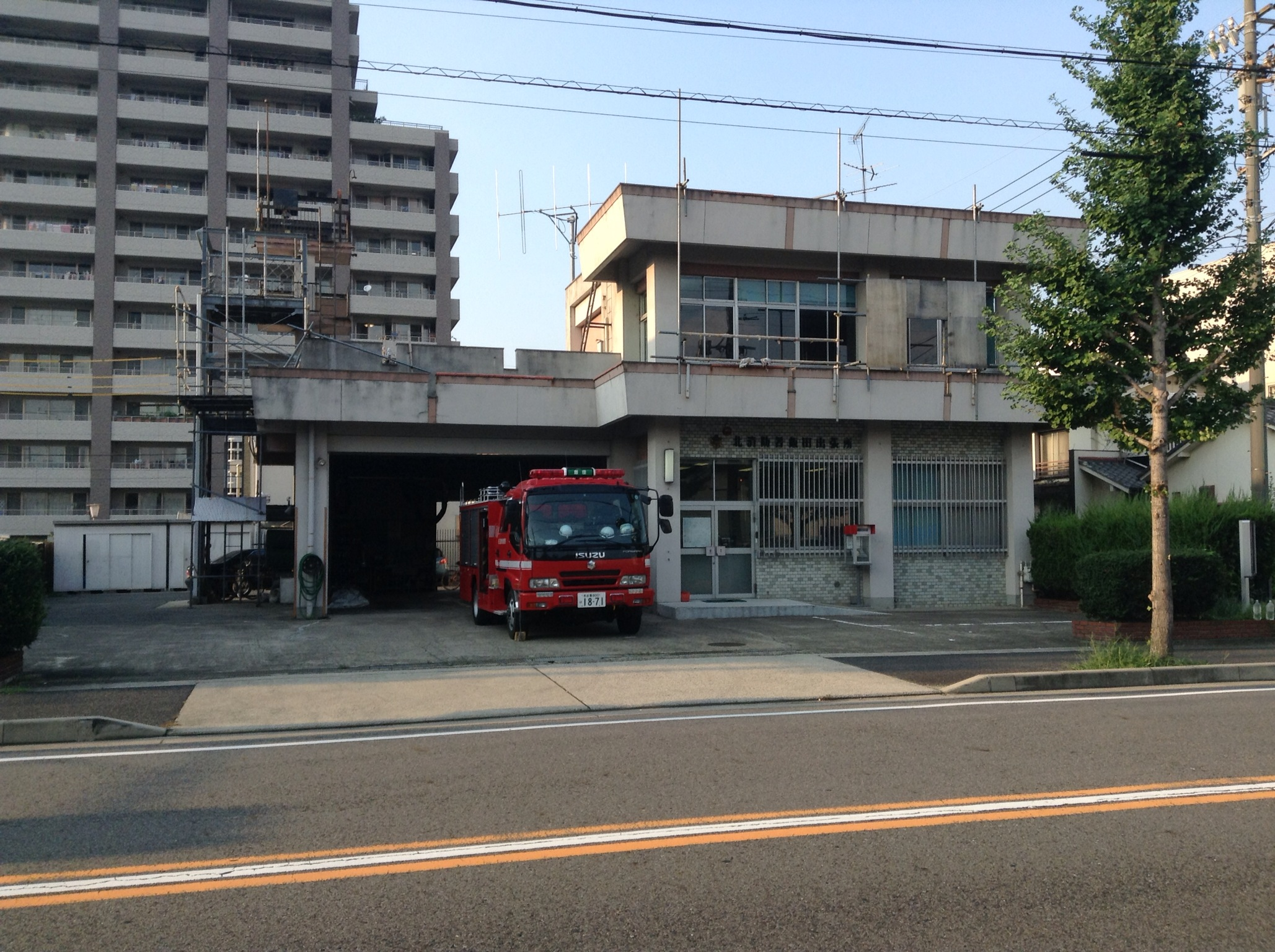 名古屋市北区芦辺町の名古屋市消防局北消防署飯田出張所を南側公道より写す